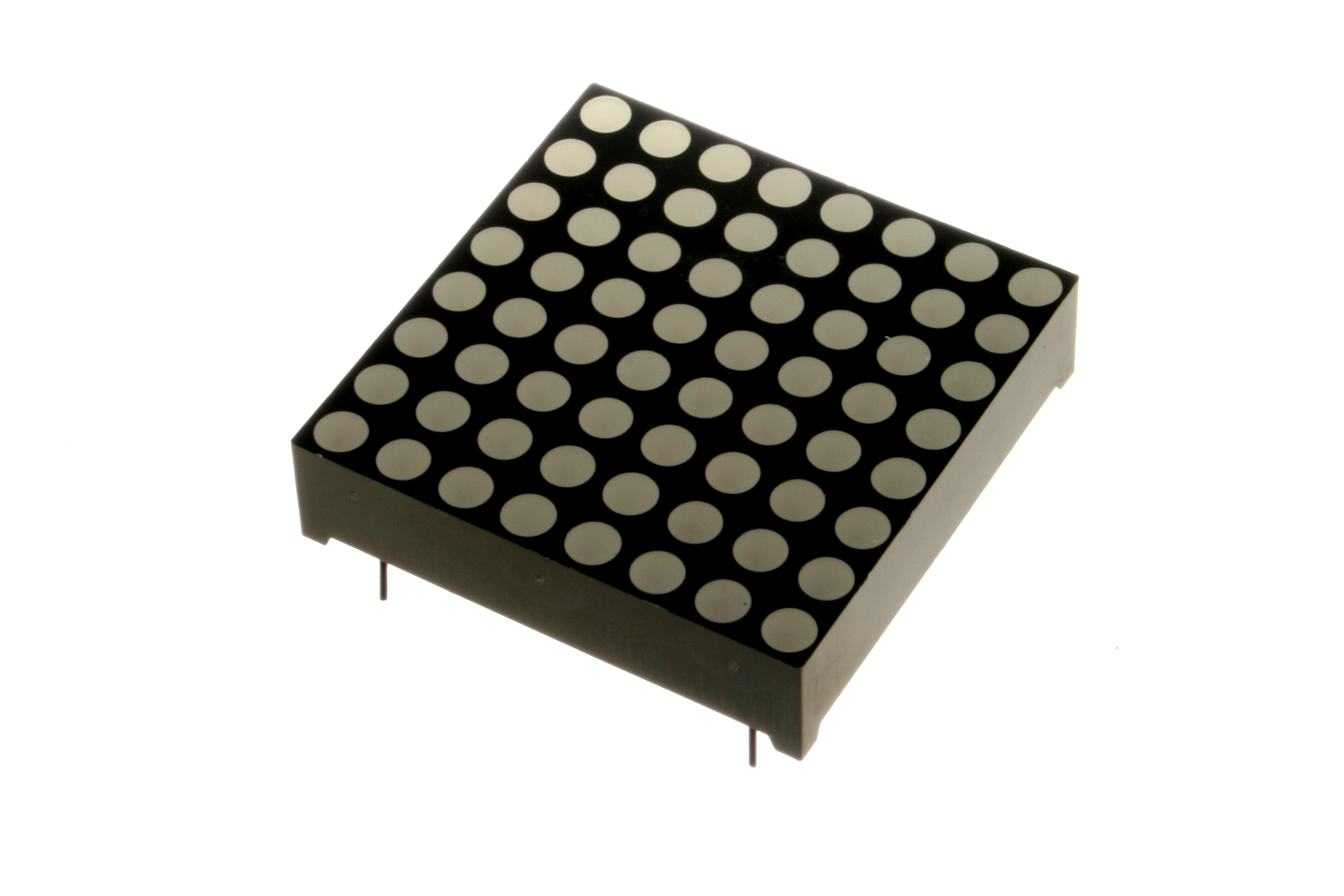 8x8 Bicolour LED Matrix.